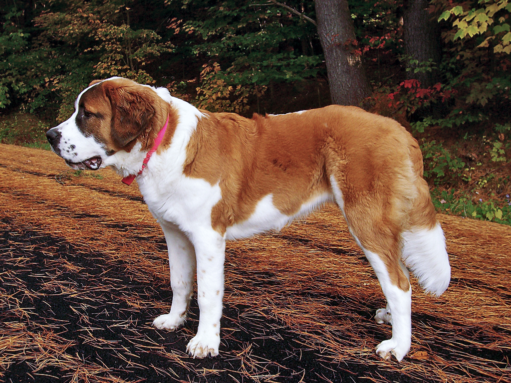 St. Bernard Dog